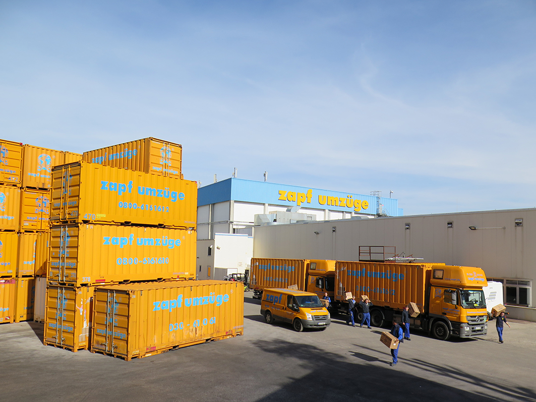 zapf umzüge AG, 1975 gegründete internationale Umzugsfachspedition mit Sitz in Berlin und Filialen in sieben weiteren Städten. Zentrale und Lager, Nobelstraße, Berlin-Neukölln.